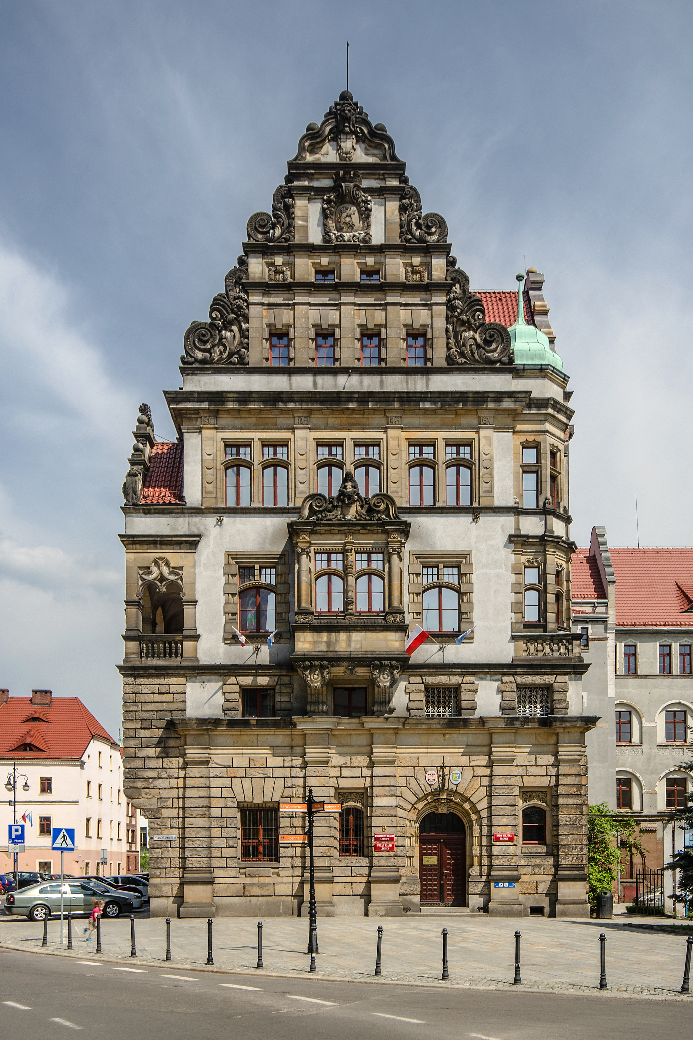 Legnica, nowy ratusz, pocz. XX